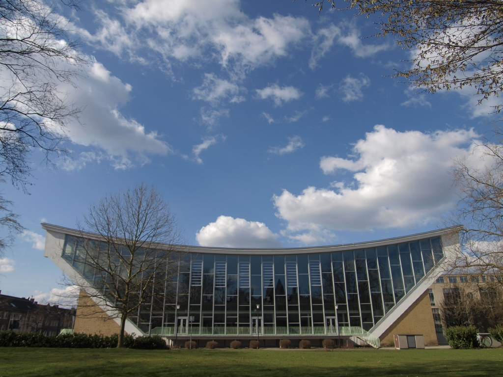 Stadtbad Wuppertal-Elberfeld auch genannt „Schwimmoper" Südstraße 29. Denkmalnr. 3748This is a photograph of an architectural monument. 3748